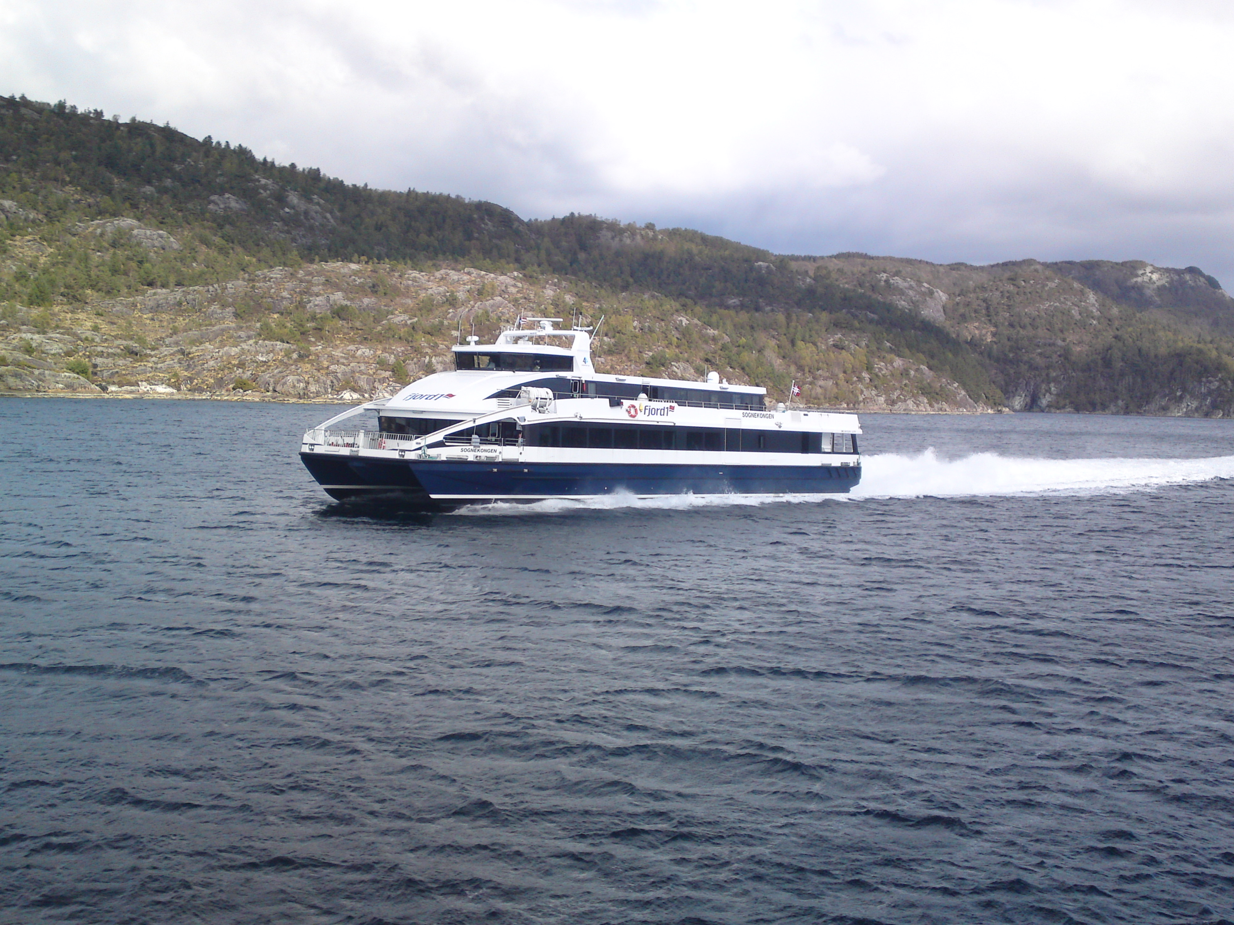 M/S Sognekongen i ruta Bergen-Selje.